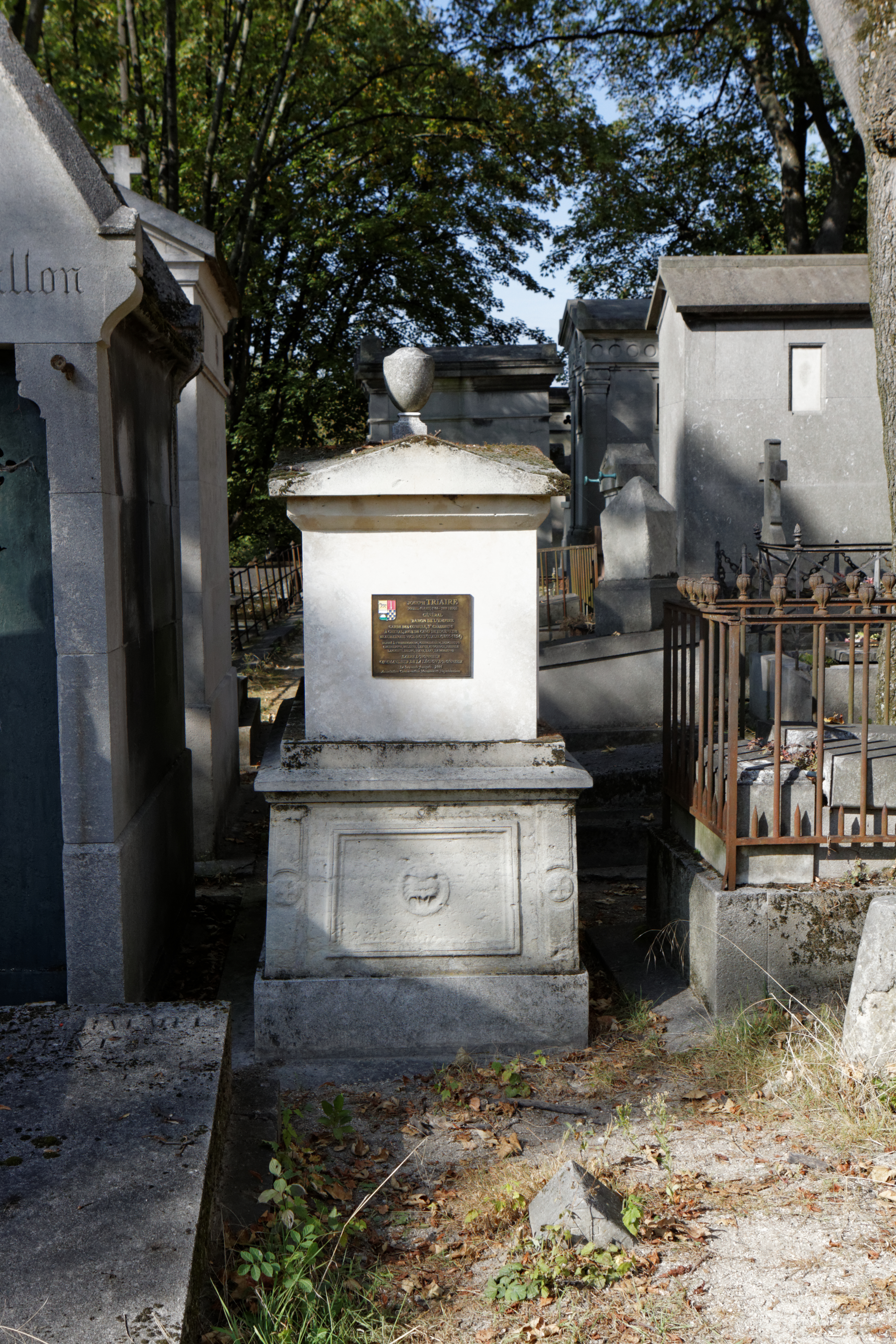 Sépulture de Joseph Triaire (1764-1850), général de brigade.